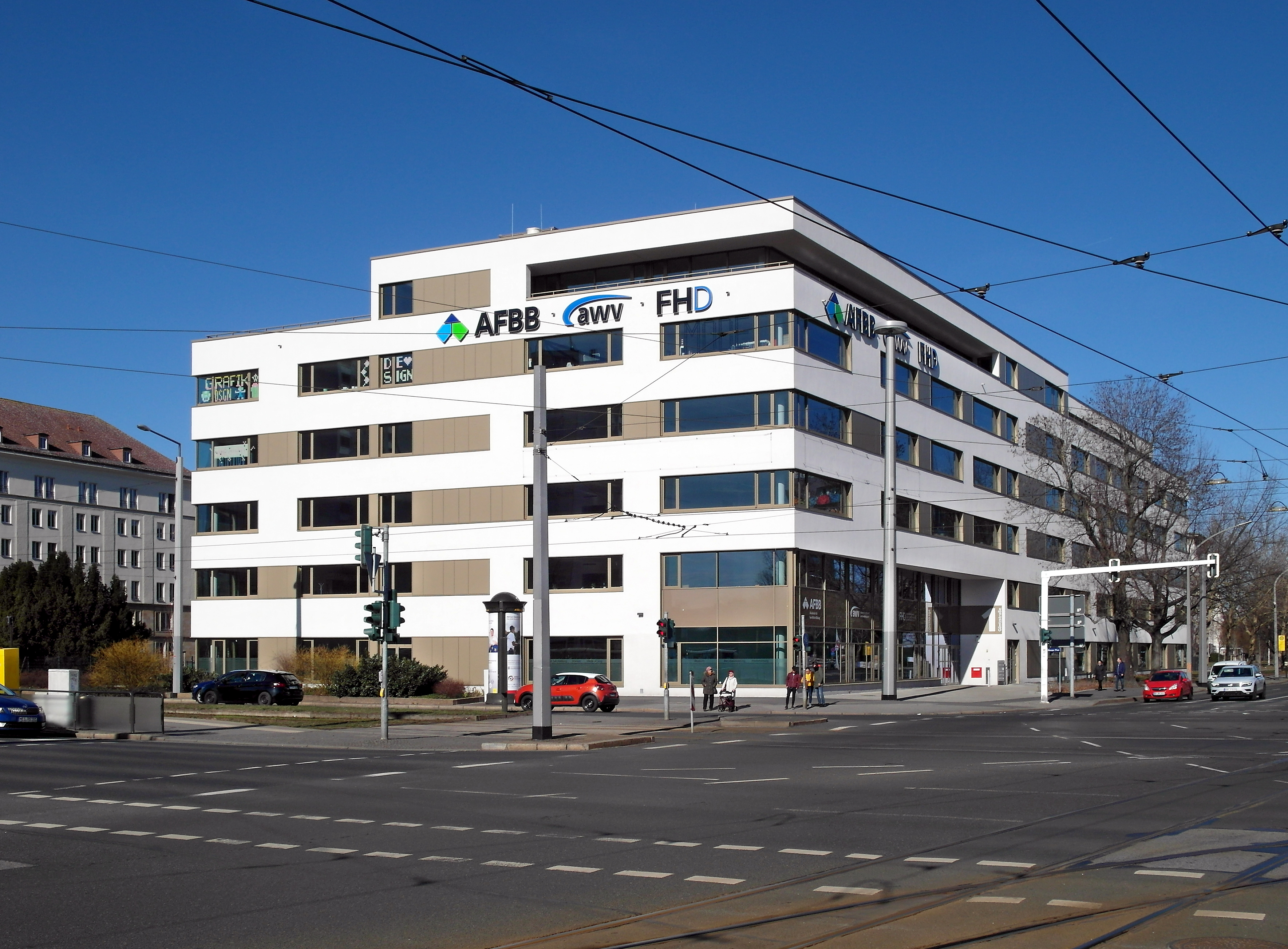 24.02.2019 01069 Dresden-Altstadt, Straßburger Platz / Ecke Grunaer Straße /Güntzstraße): Blick von Süden über den Straßburger Platz. AWV-Schulcampus, Akademie für Wirtschaft und Verwaltung - AFBB, awv und FHD (GMP: 51.046994,13.754807). [SAM9674.JPG]20190224160DR.JPG(c)Blobelt